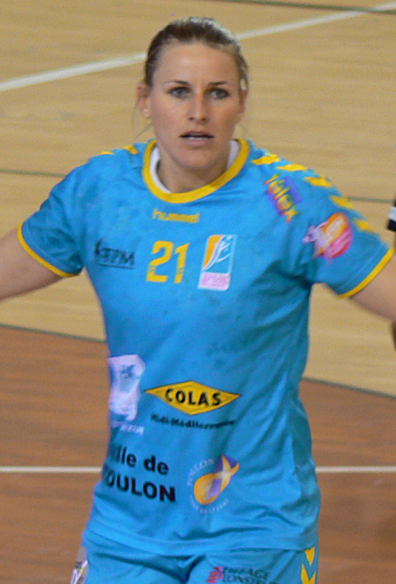 Marie-Paule Gnabouyou et Héléna Sterbova,respectivement arrière droite et arrière gauche de l'équipe de Toulon St-Cyr Var Handball, en défense contre Amélie Goudjo, pivot de Issy Paris Hand, le 21 mars 2014.